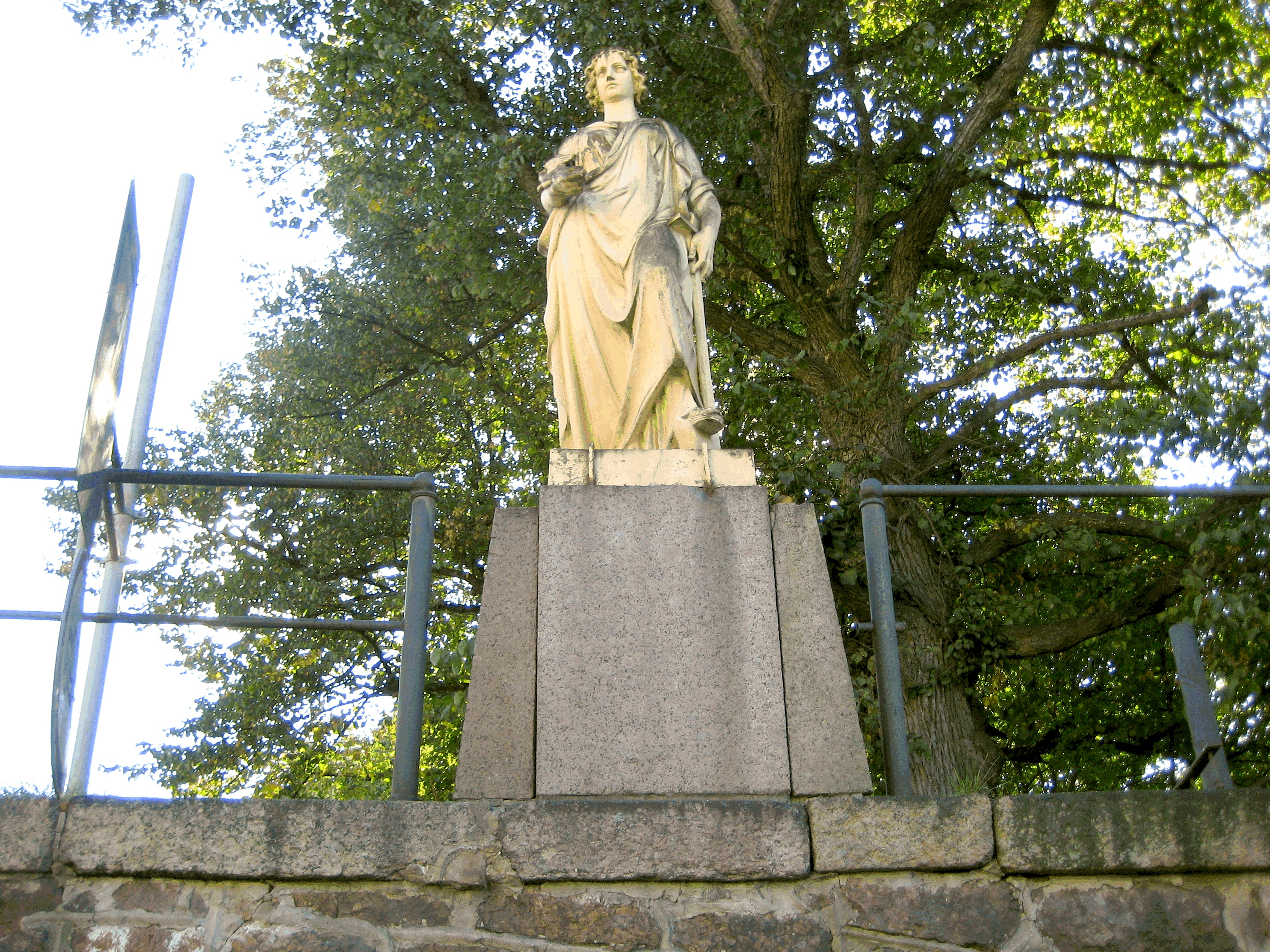 Выборг. Скульптура "Торговля"